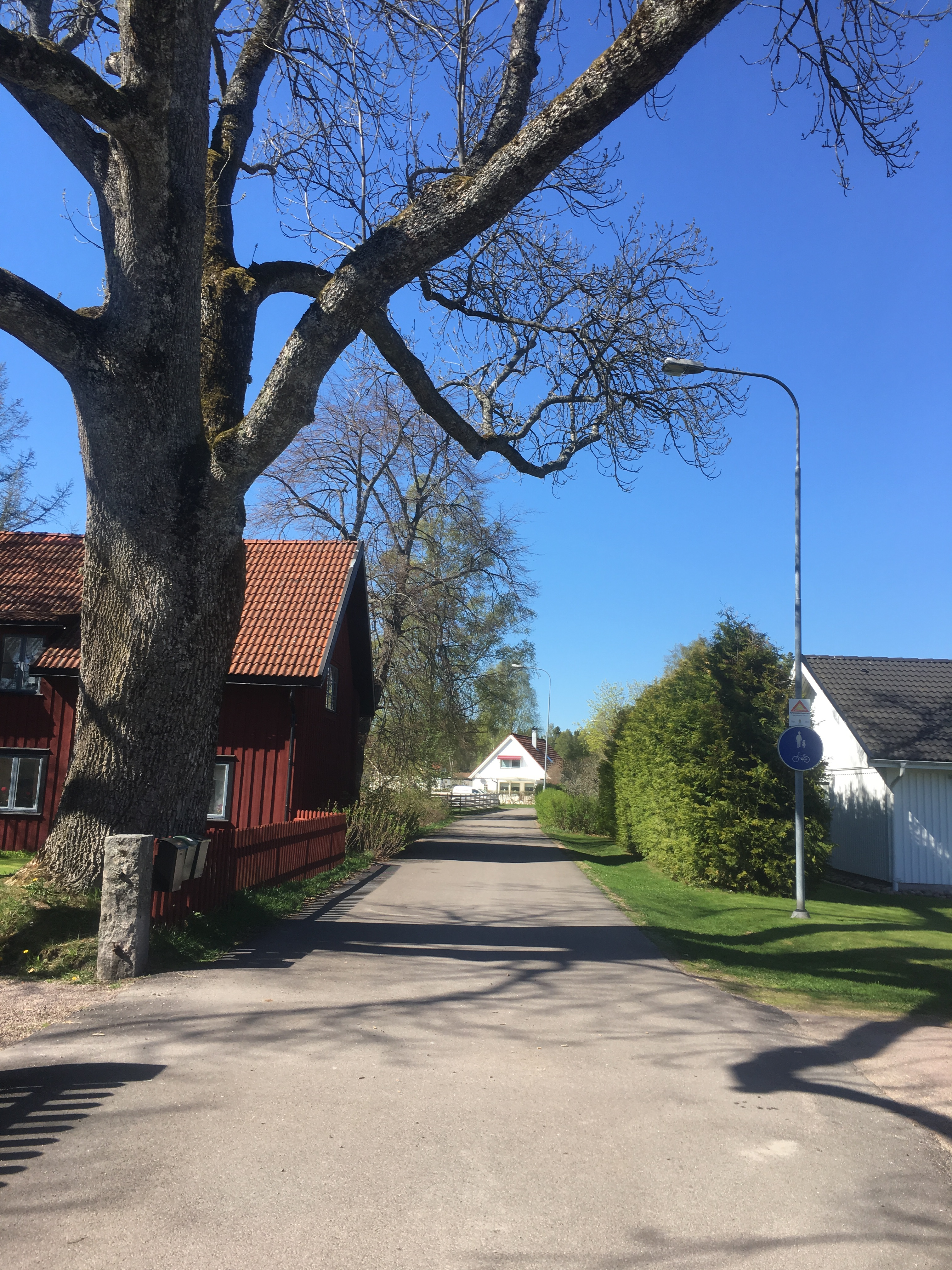 Henstapromenaden